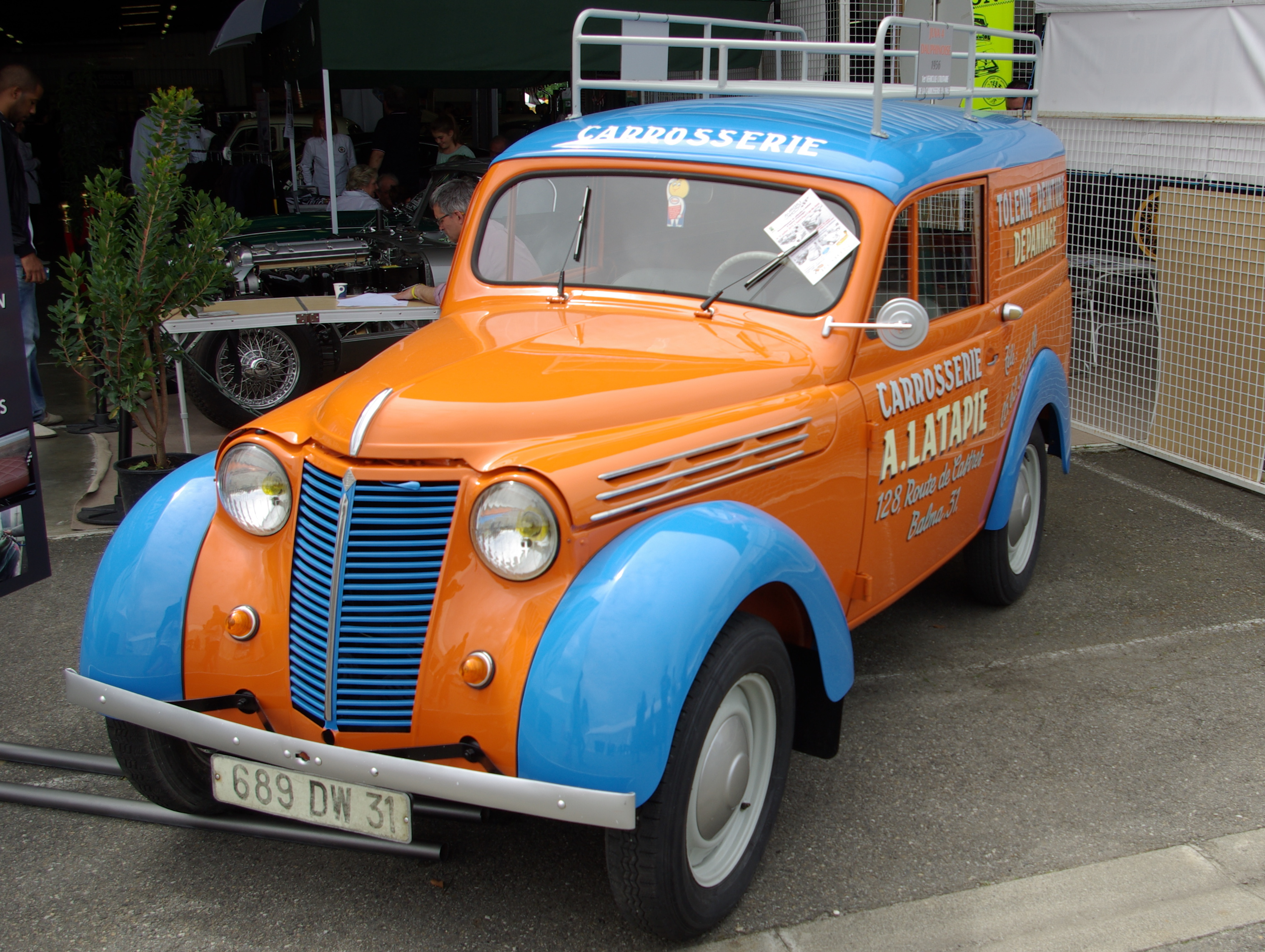 Renault Juvaquatre au salon Midi Auto Retro de Beauzelle en 2015.